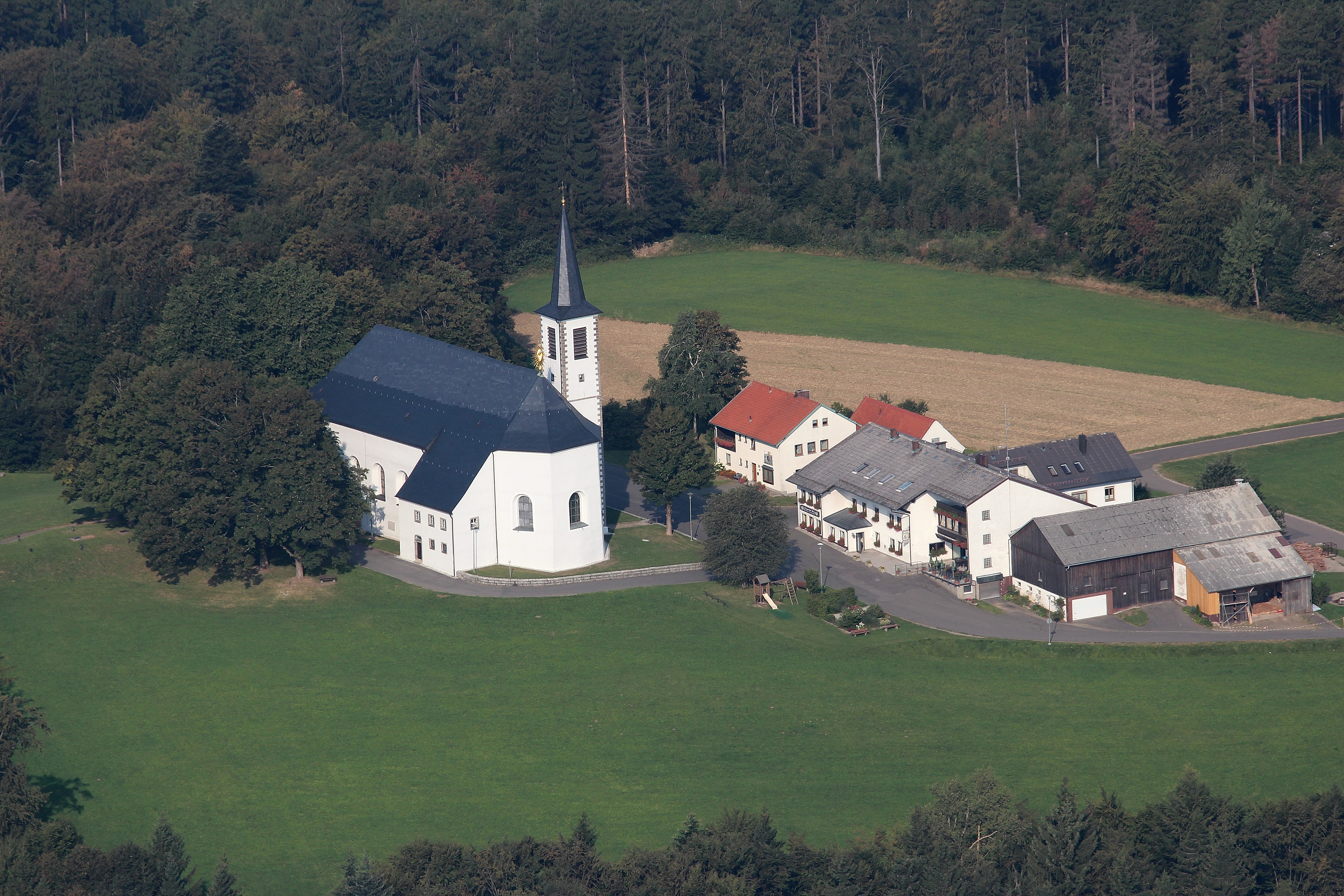 Wallfahrtskirche Mariä Heimsuchung auf dem Fahrenberg, Ortsteil Oberfahrenberg; Gemeinde Waldthurn, Landkreis Neustadt an der Waldnaab, Oberpfalz, Bayern